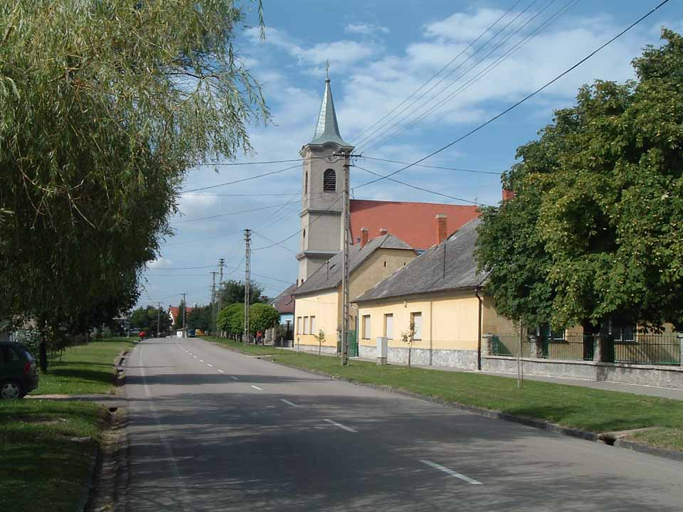 The church of Nagyesztergár, Hungary. Nepomuki Szent János római katolikus templom